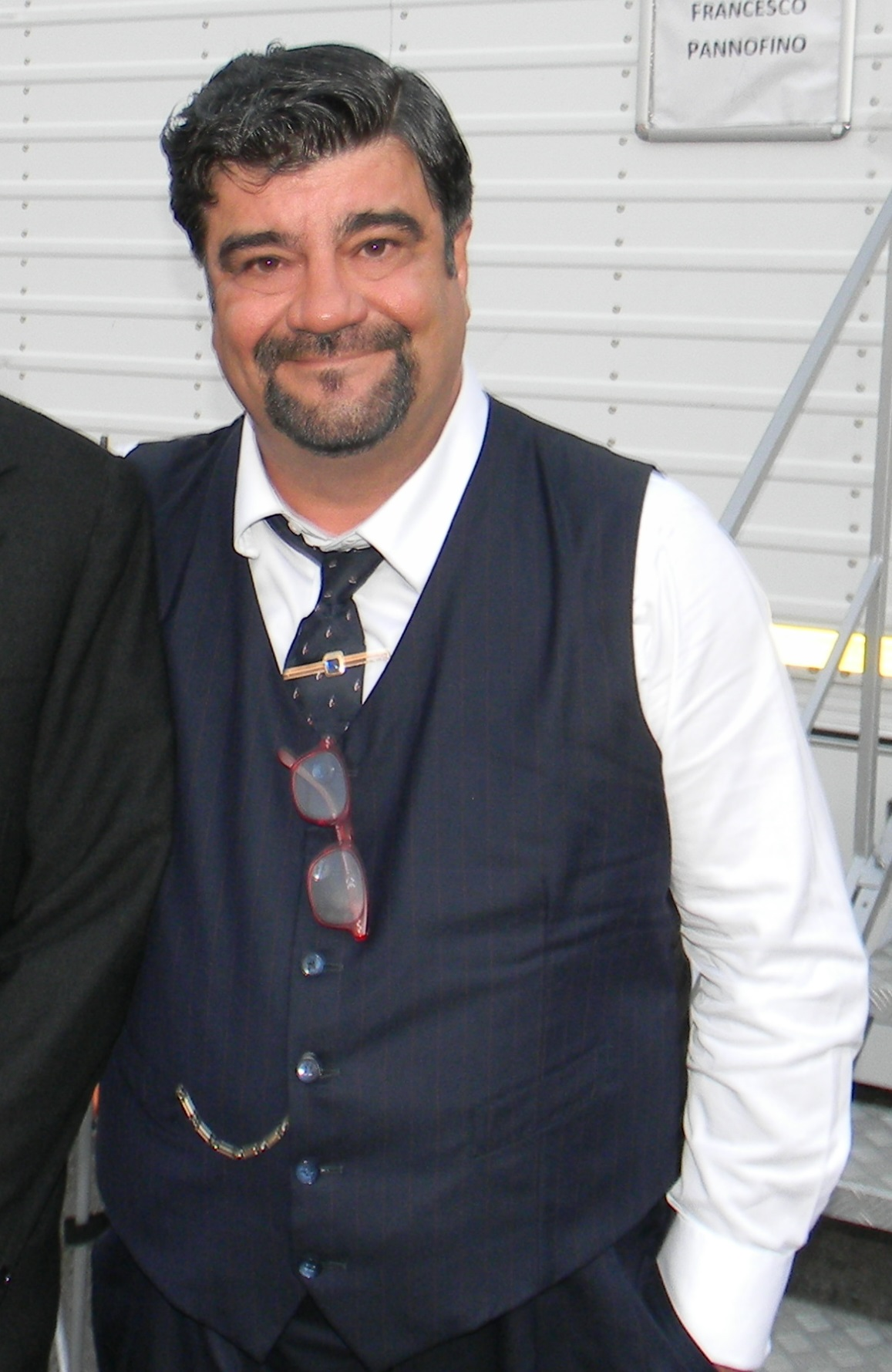 l'attore Francesco Pannofino nei panni di Augusto Vanghetta nel film Il pretore diretto da Giulio Base.